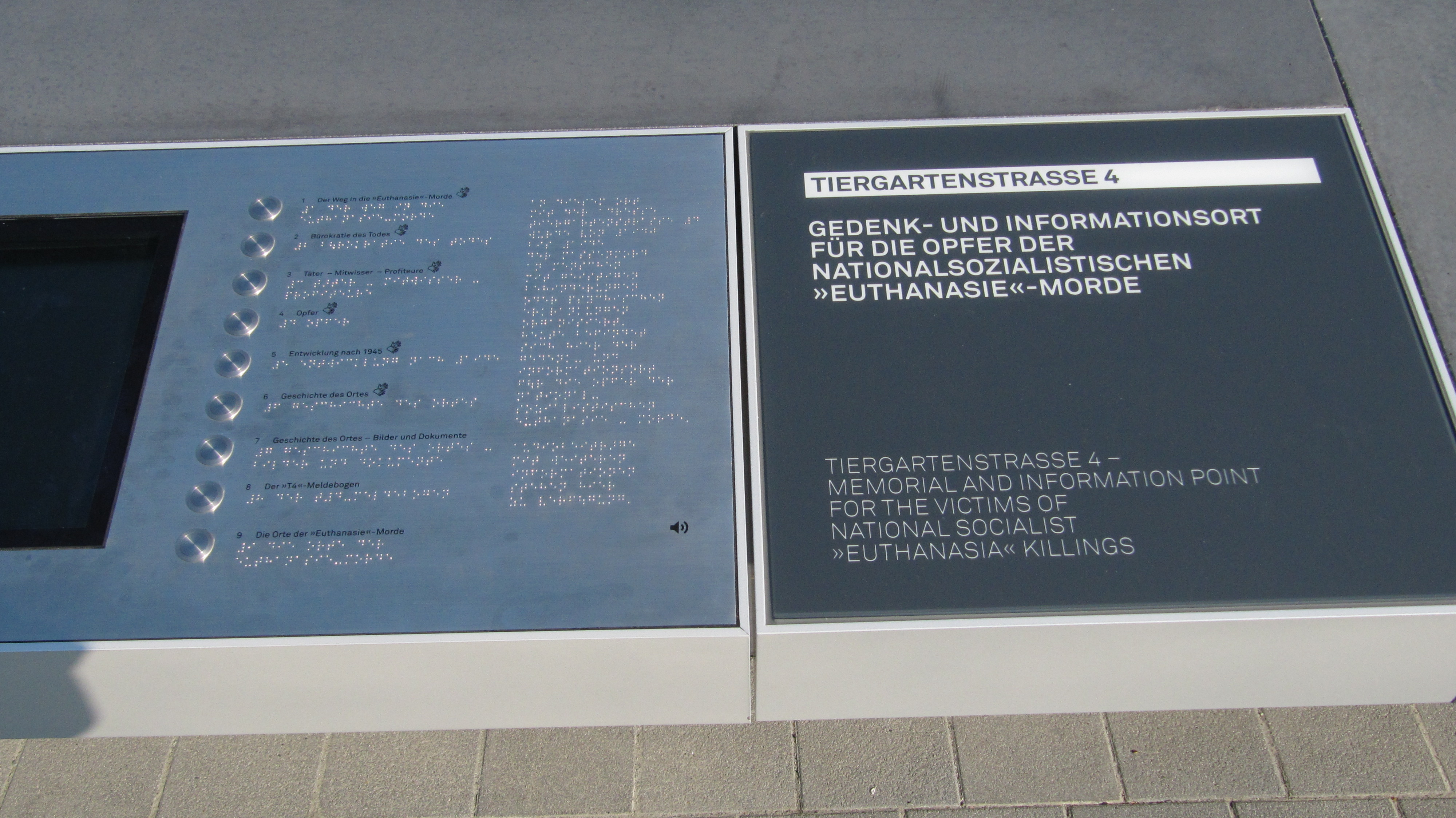 Gedenk- und Informationsort für die Opfer der nationalsozialistischen „Euthanasie“-Morde